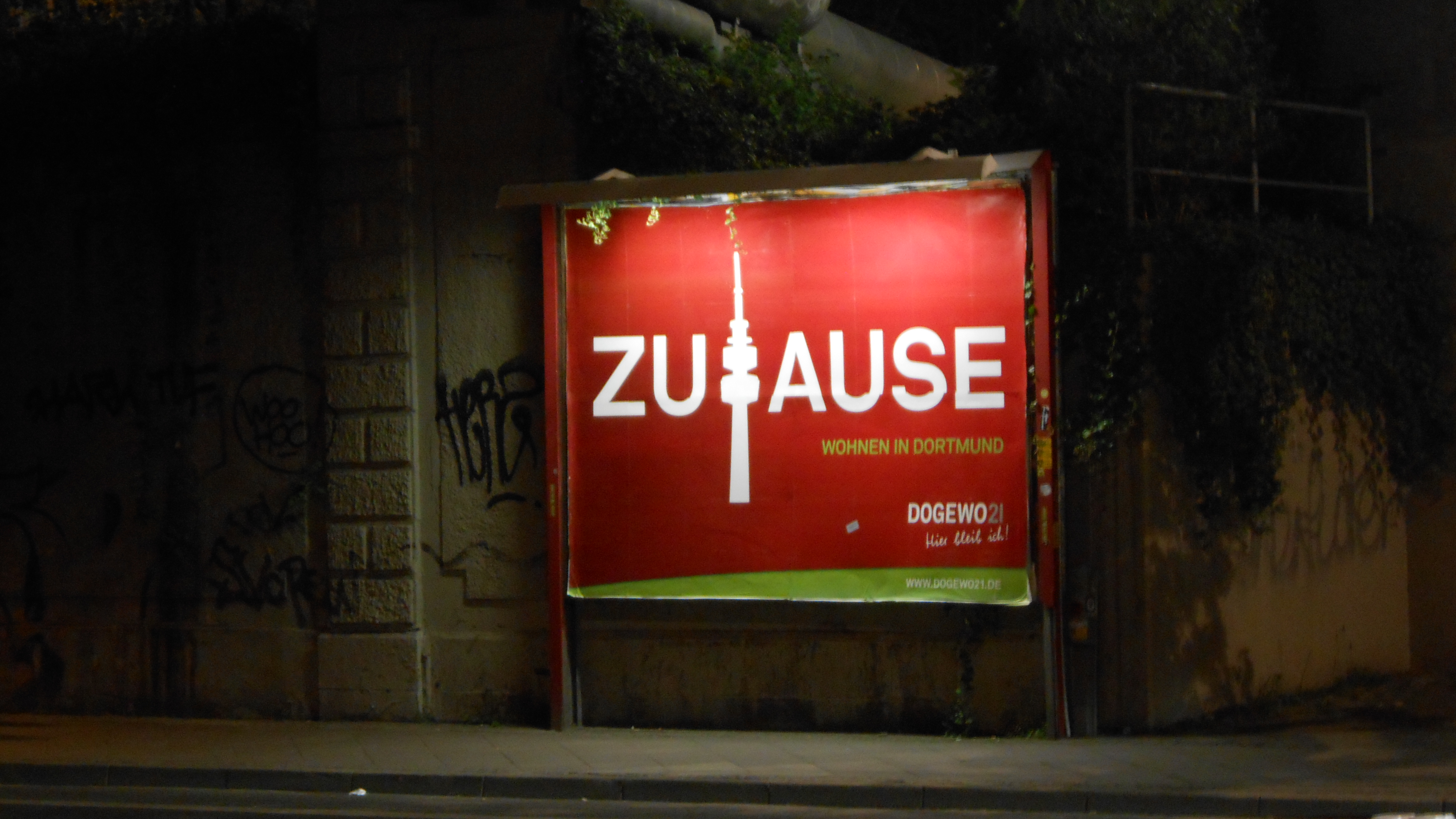 Plakat der DoGeWo21 an der S-Bahn-Brücke Hohe Straße in der südlichen Dortmunder Innenstadt, gesehen am Abend des 7. Mai 2016.